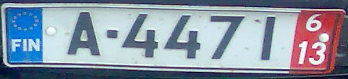 Номерной знак автомобилей, экспортируемых из Финляндии